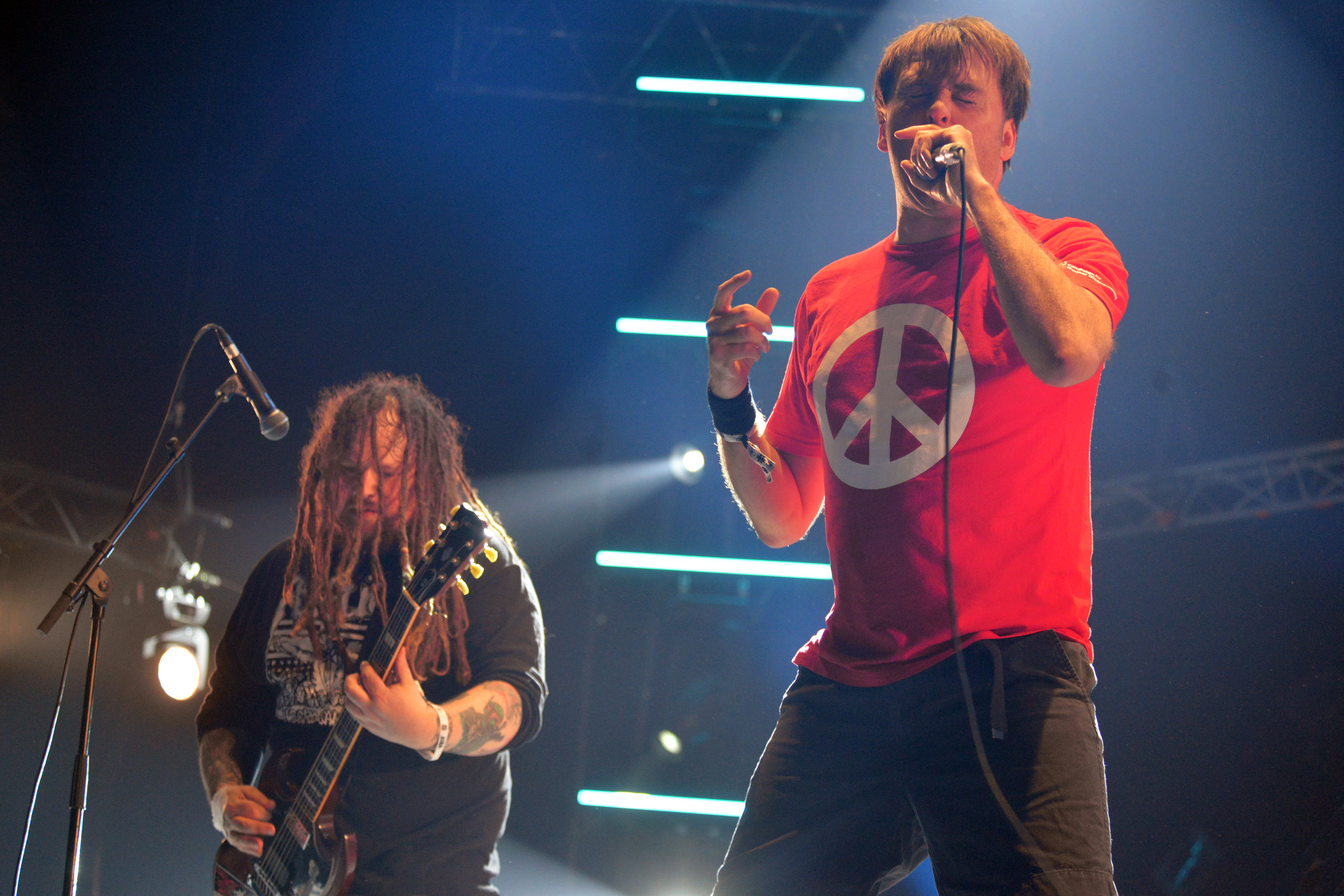 Le groupe anglais Napalm Death sur la scène Altar du Hellfest 2018.